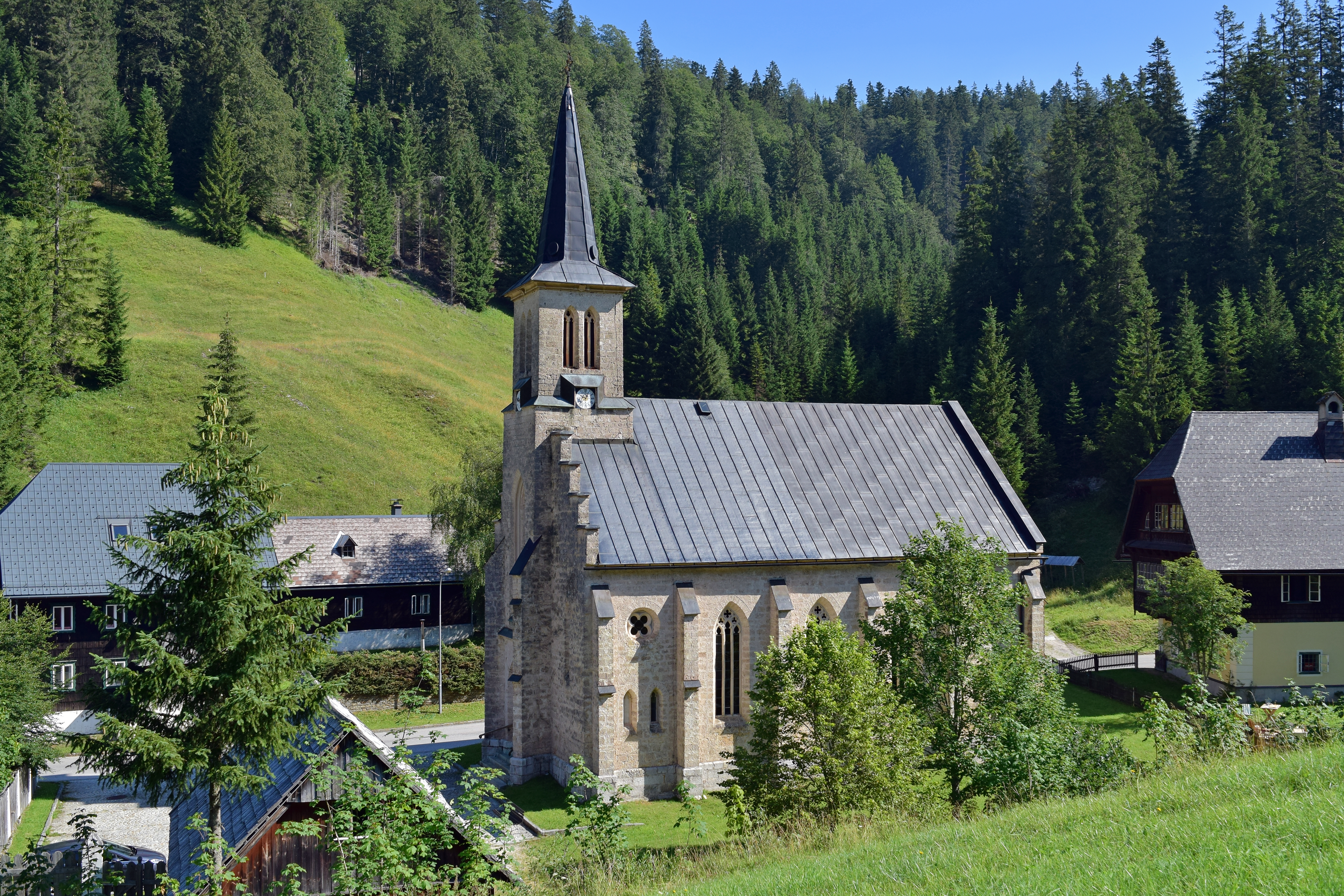 Kath. Pfarrkirche Zur Kreuzauffindung